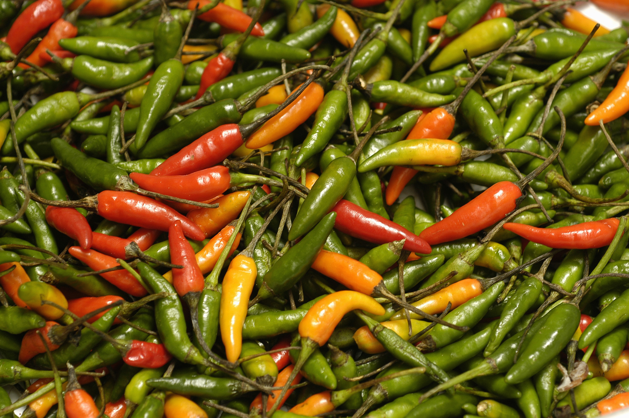 Capsicum frutescens var malagueta Pimenta malagueta (fruto)